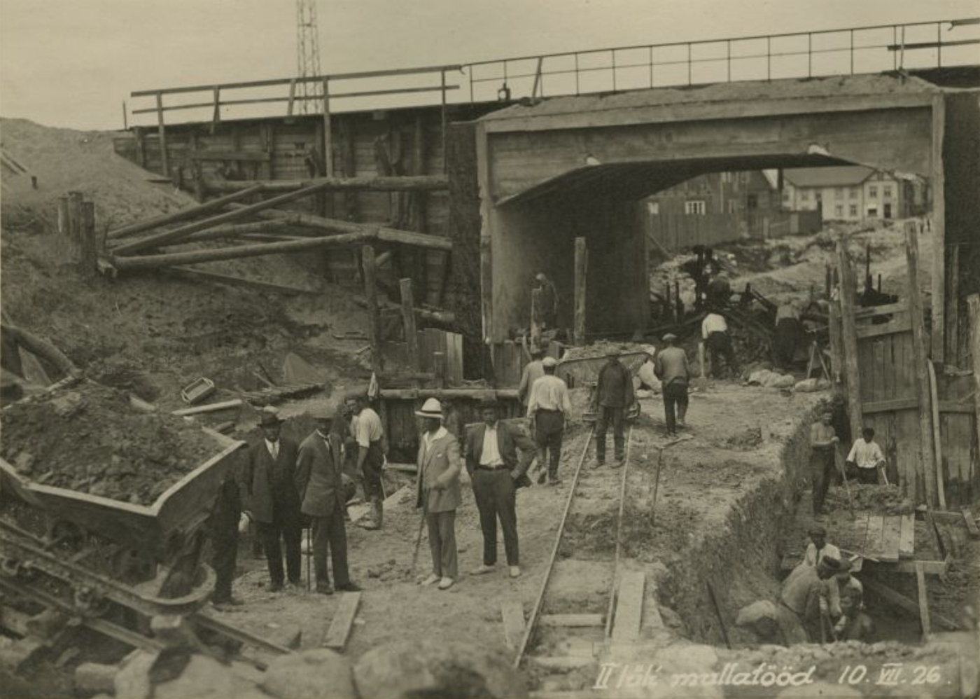 Rohu tn viadukti ehitamine.